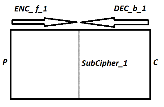 En illustration af et kryptografisk angreb kendt ved titlen: meet in the middle attack